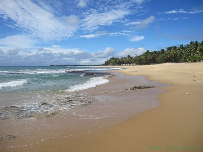 Plage de Sambava